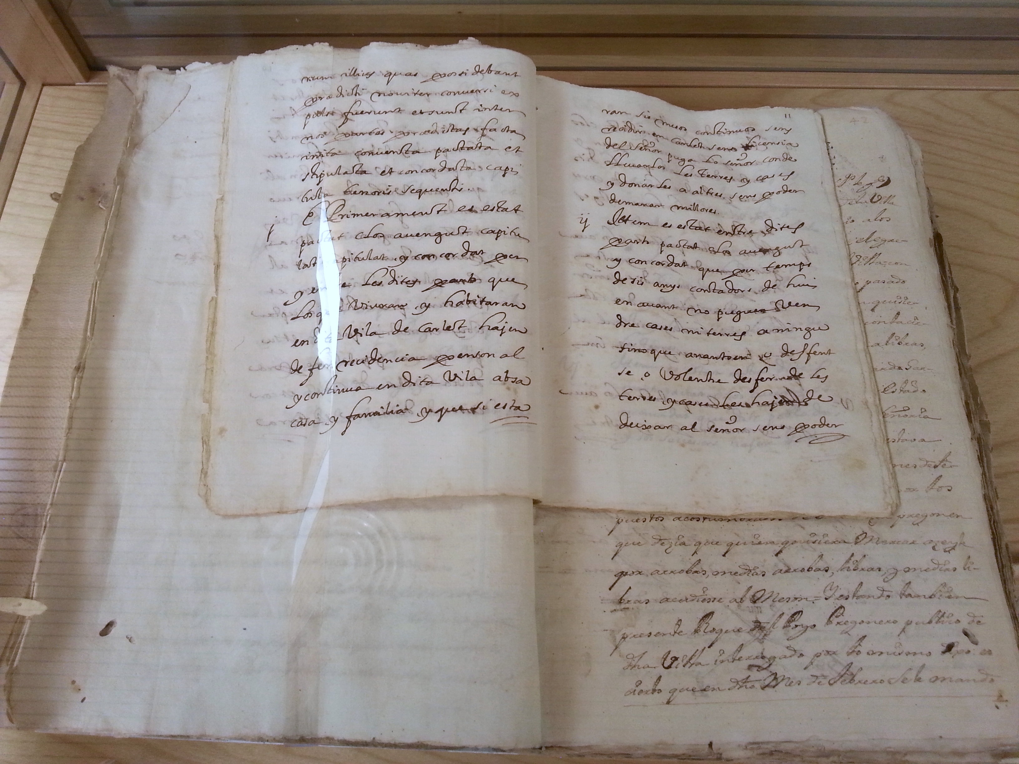 En Jordi de Castellví, senyor de Carlet, concedeix una nova carta pobla al lloc de Carlet, despoblat per l'expulsió dels moriscos, per a 100 cristians (any 1610). Arxiu del Regne de València. ARVː Escrivanies de cambra, 1720, expedient 29 (còpia de 9 de juny de 1696).